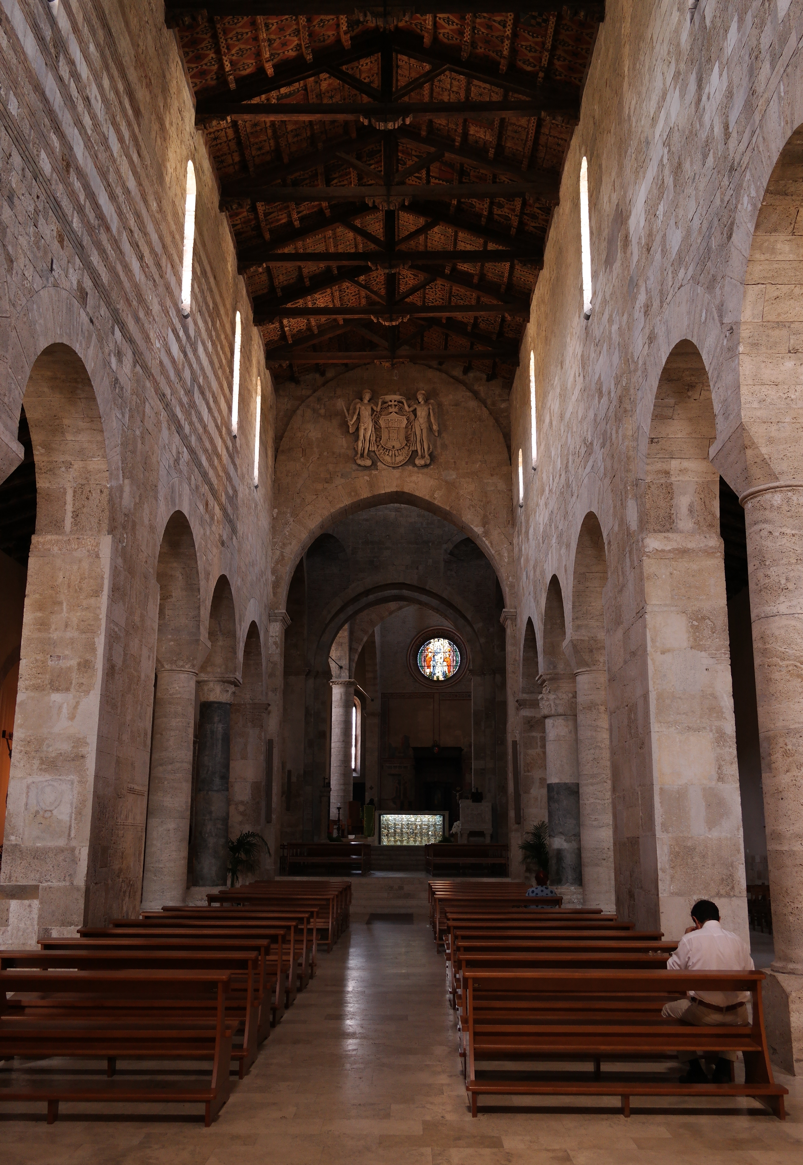 Interno del Duomo di Teramo